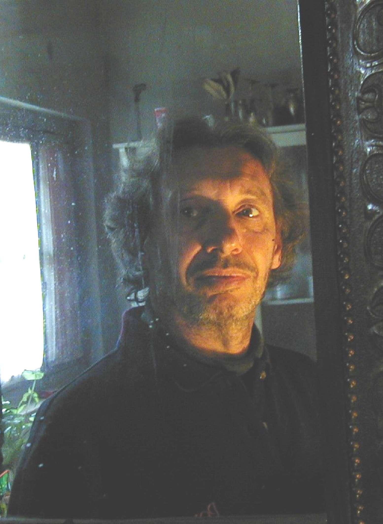 Foto de Juanjo Novaira